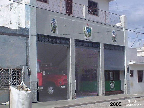 Cuartel de Bomberos